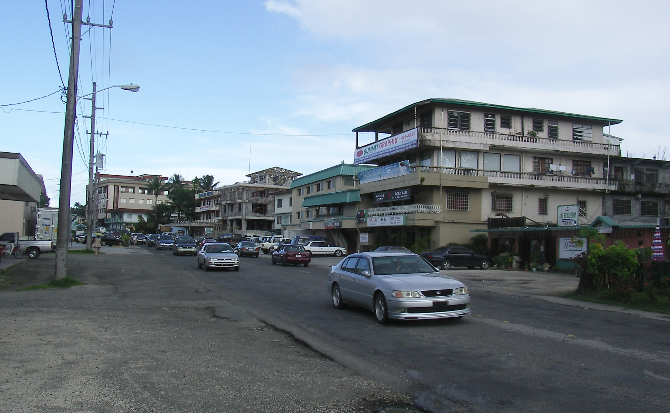 Koror Downtown, ehemalige Hauptstadt Palaus